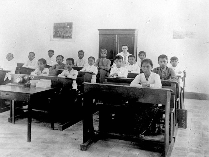 Repronegatief.